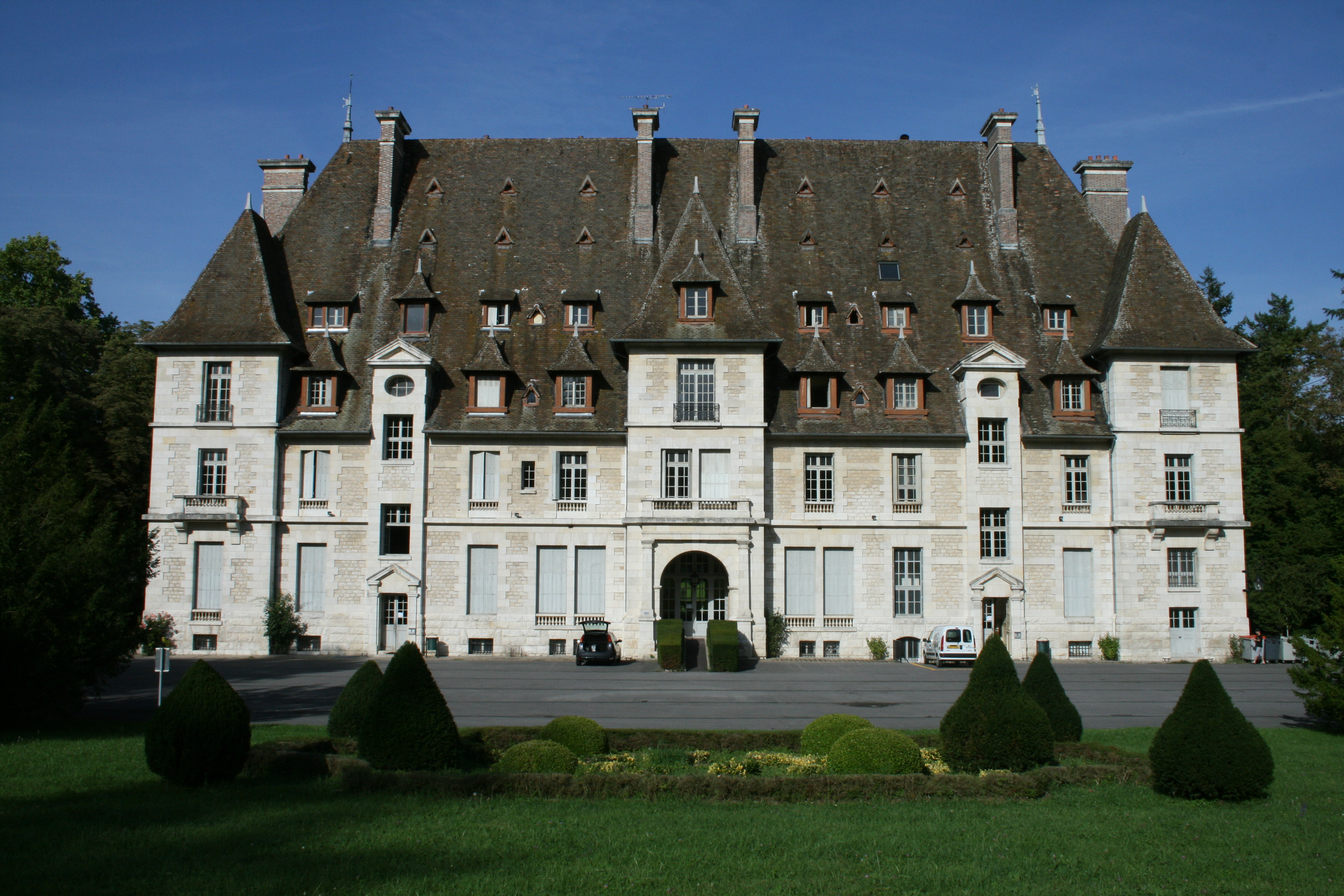 Le château de Nanteau-sur-Lunain en Seine et Marne. France